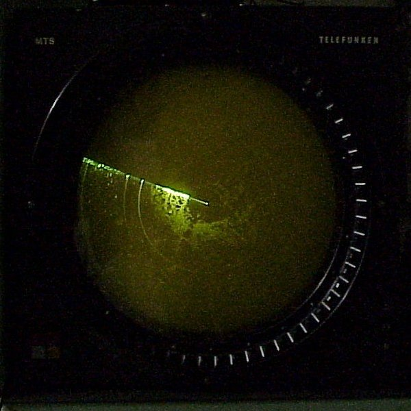 PPI-Scope der Firma Telefunken aus dem Jahre 1980